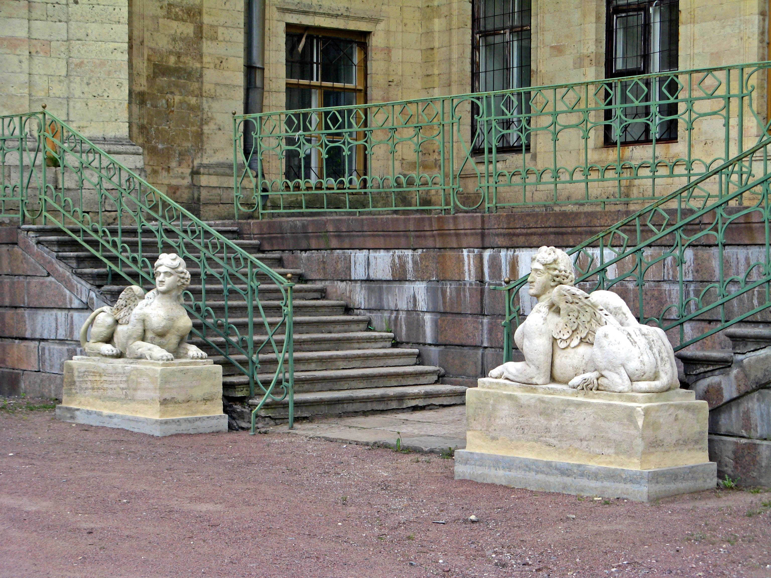 Статуи "Крылатый сфинкс", Дворцовый парк, "Собственный сад", Гатчина